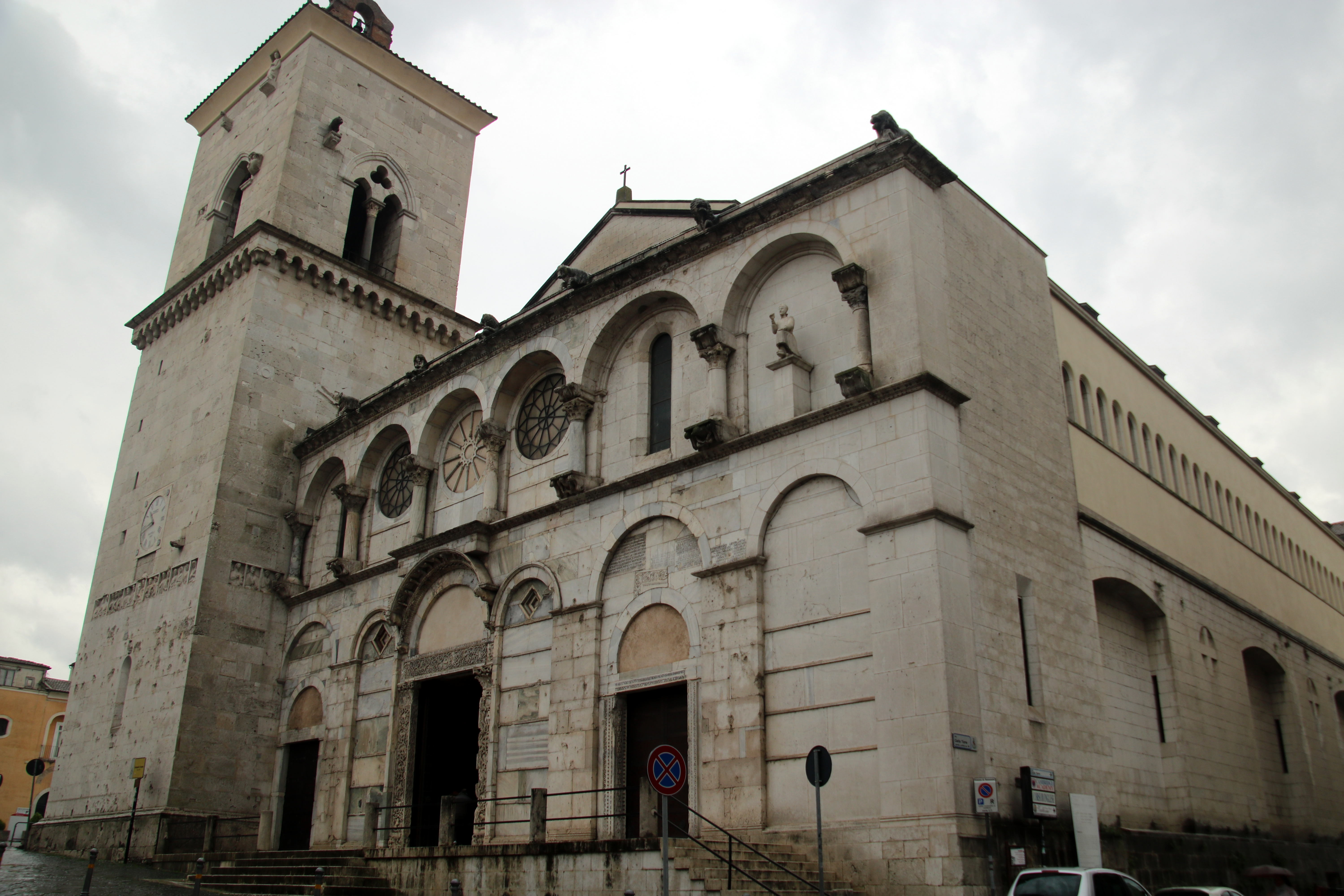 Duomo di Benevento, facciata